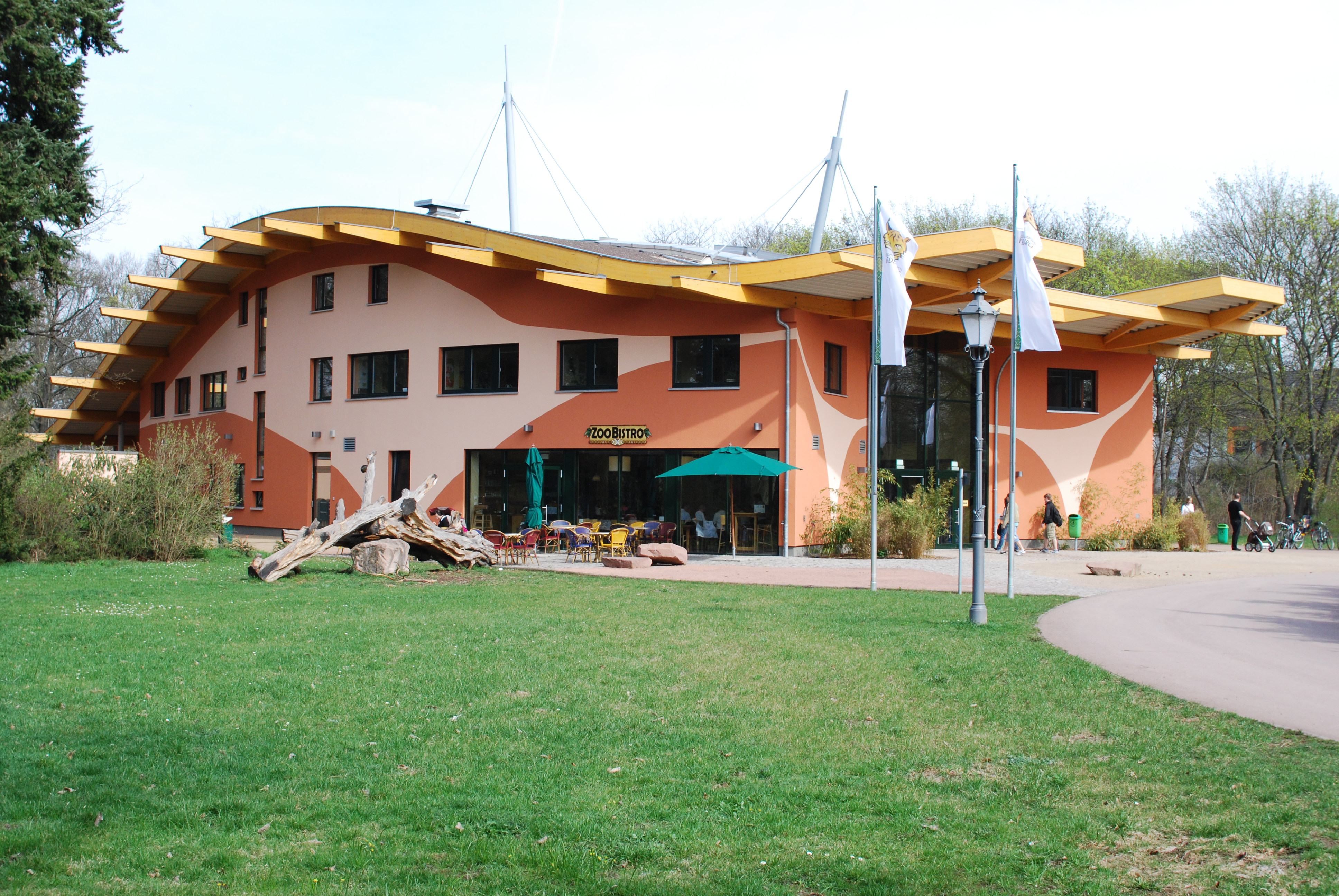 Eingang zum Zoo Magdeburg